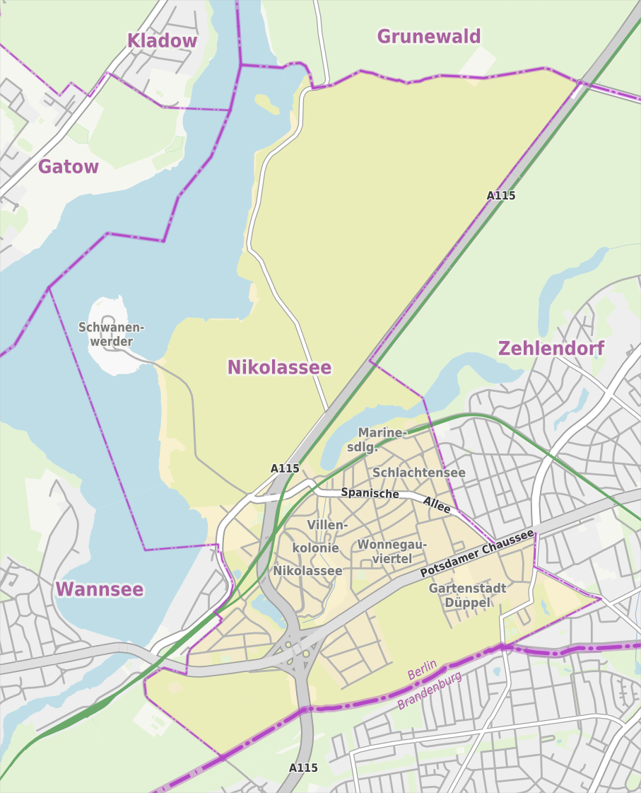 Übersichtskarte der Straßen und Ortslagen in Berlin-Nikolassee